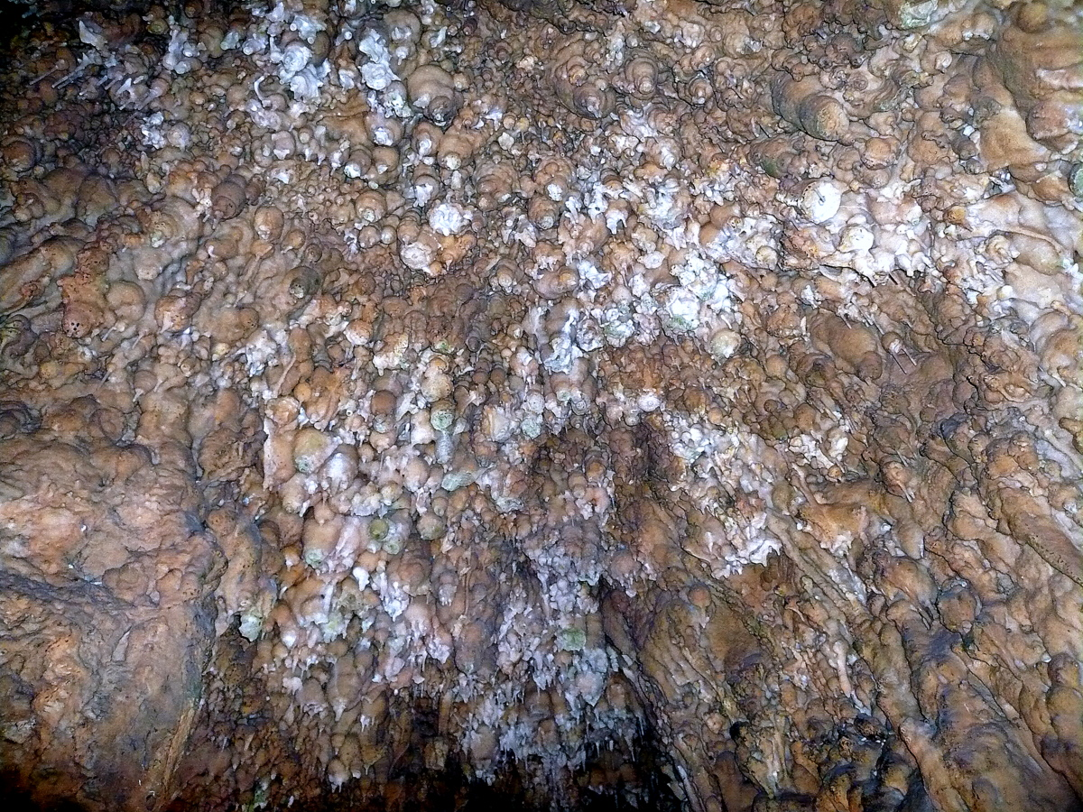 Charlottenhöhle